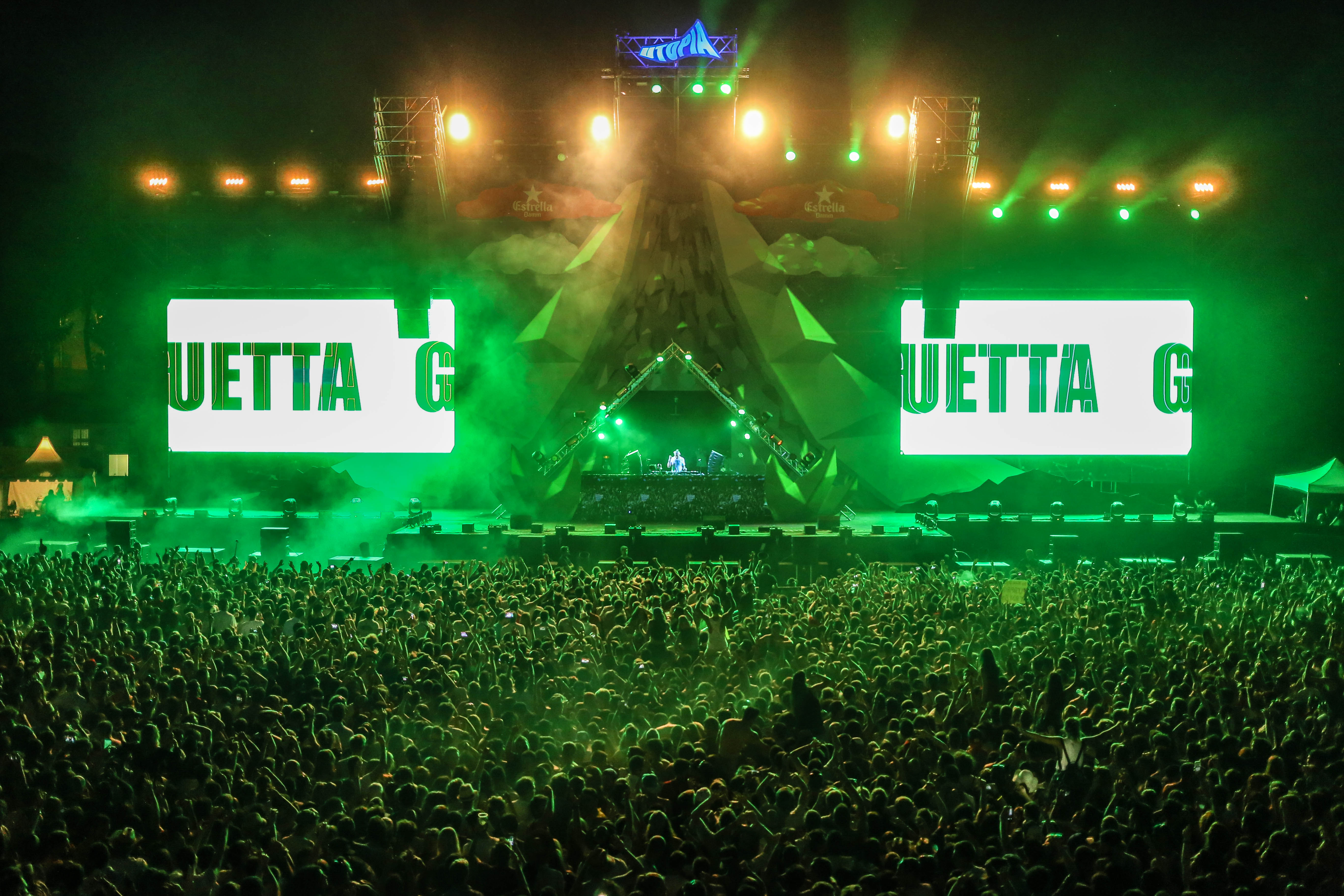 Utopía Festival 2016 (Madrid, España)